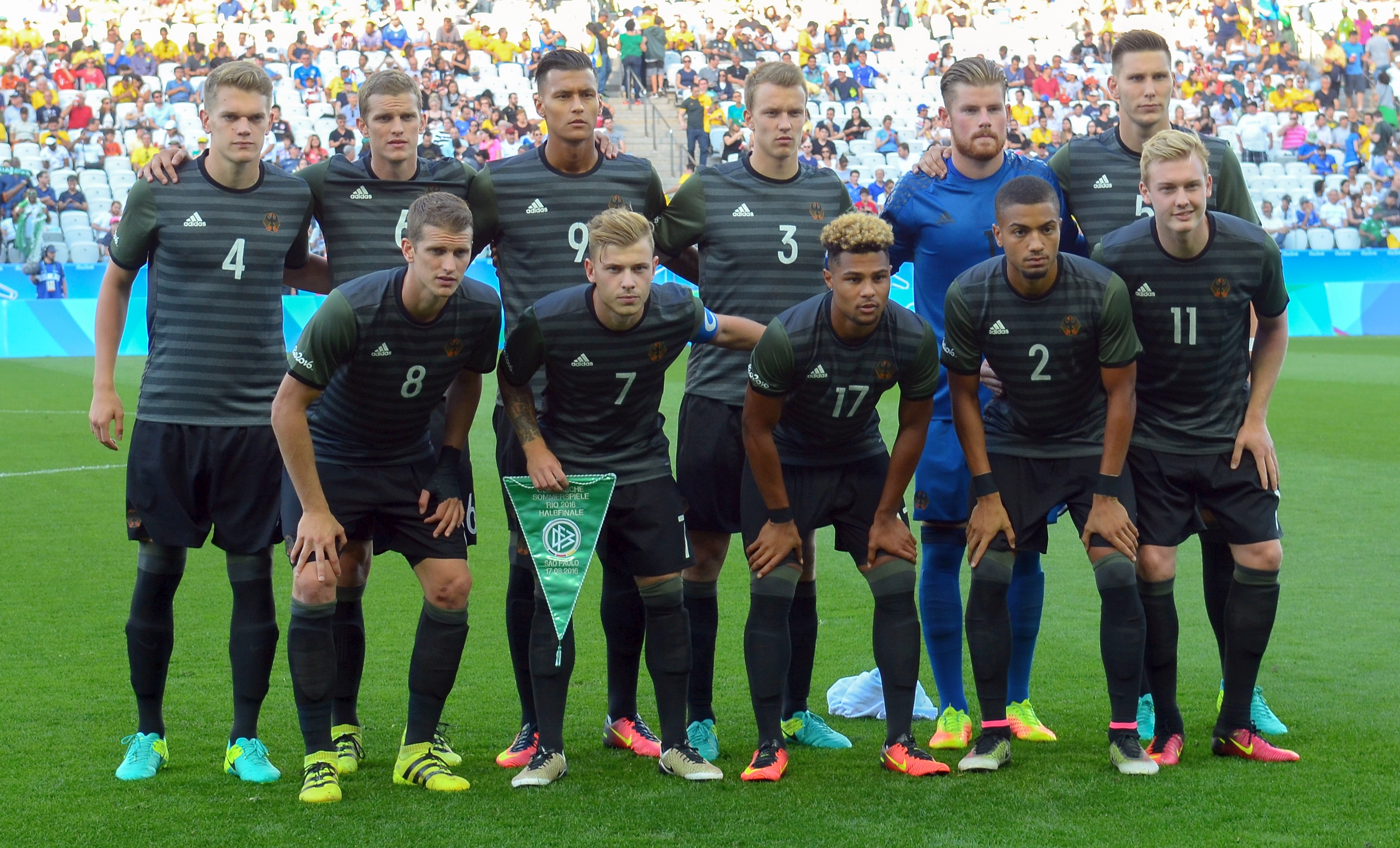 São Paulo - Alemanha vence a Nigéria por 2 a 0 e se classifica para a final na Arena Corinthians (Rovena Rosa/Agência Brasil)